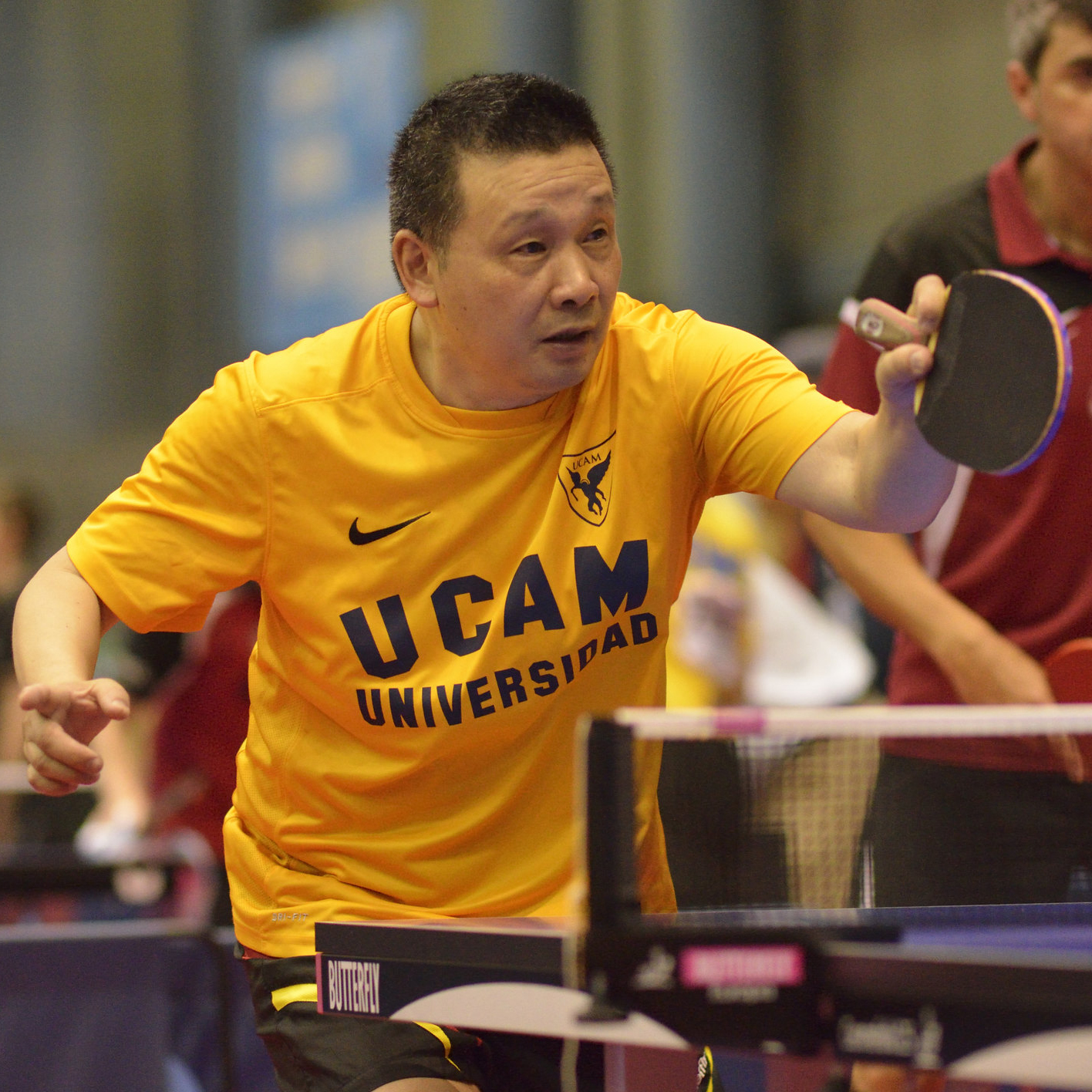 Fotografía: Demetrio Carlos García Esteban